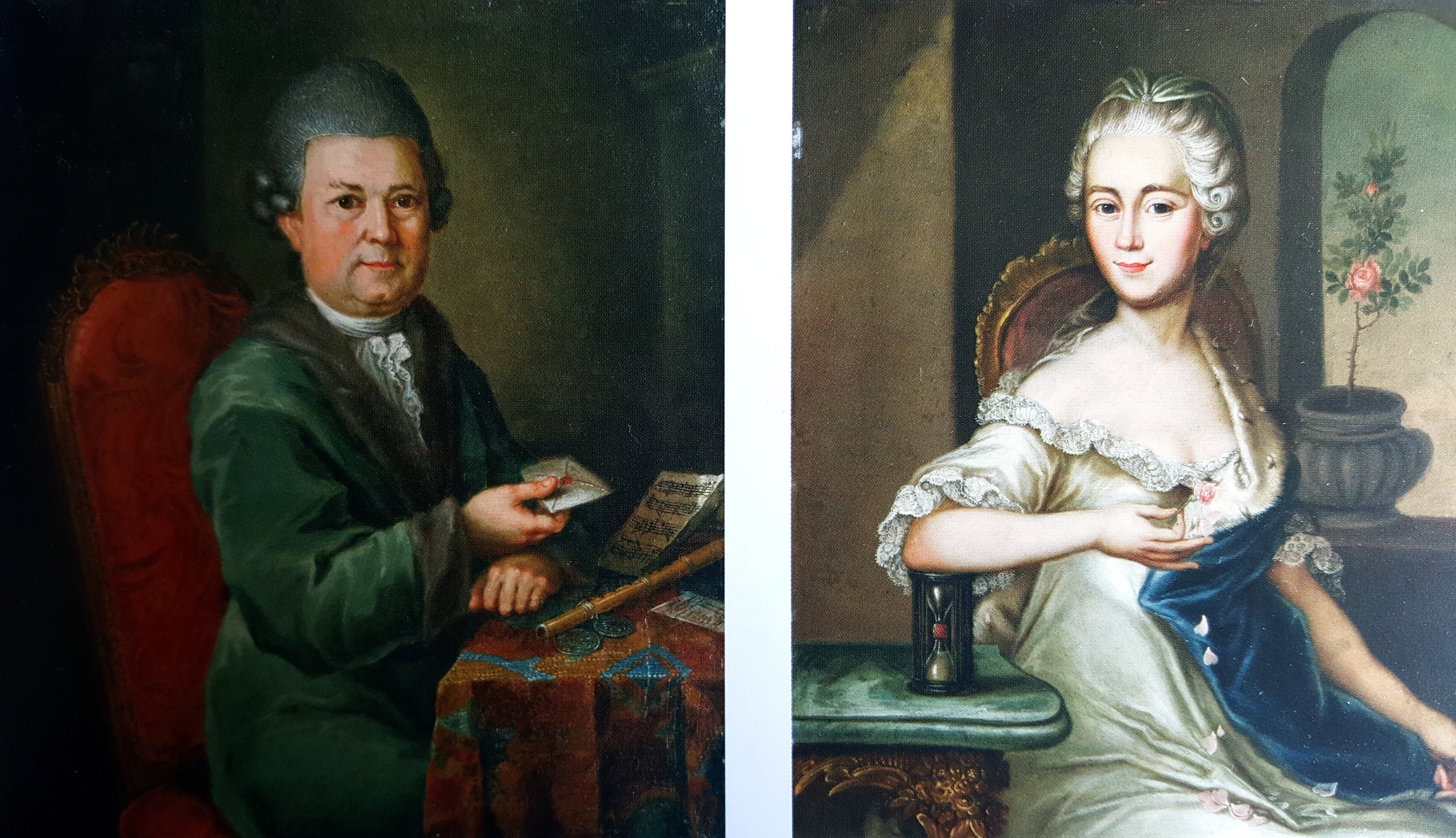 Gottob Siegemund Knoefvel, Portret C.A. Rotha i Portret żony C.A. Rotha, 1772, 42 x 35, 6 Muzeum Narodowe we Wroclawiu